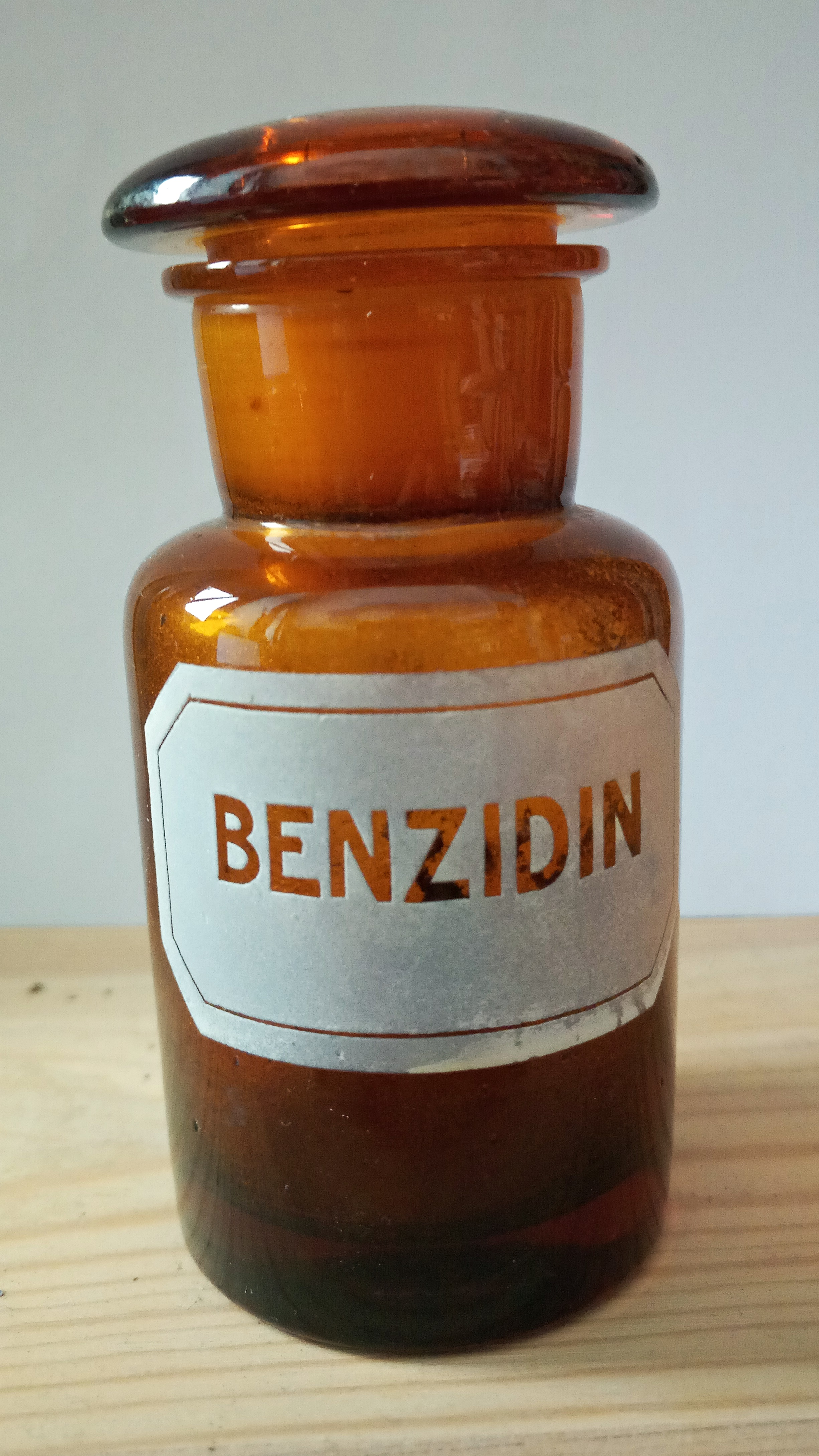 Benzidin-Flasche, um 1910 (aus der Schwanen-Apotheke Grünstadt)